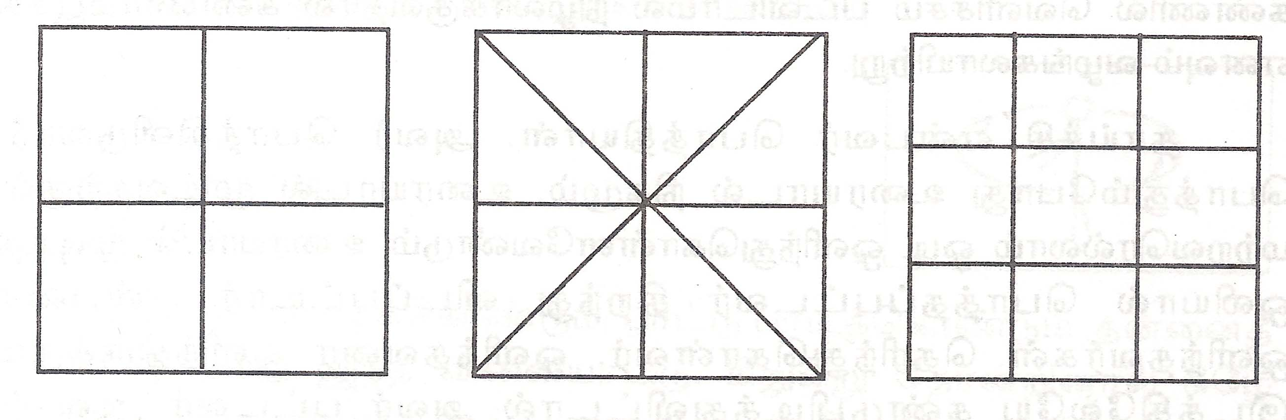 Own creation. மறைகின்ற விளையாட்டுகள் என்னும் என்னுடைய நூலிலிருந்து எடுக்கப்பட்டது. - கட்ட-விளையாட்டு அரங்கம்